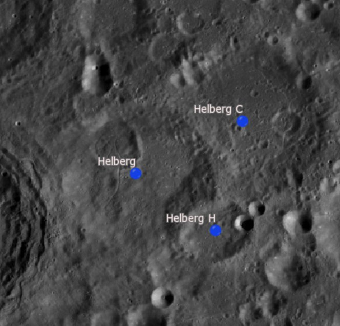 Cráter lunar Helber. Cráteres satélite. (Imagen LRO)